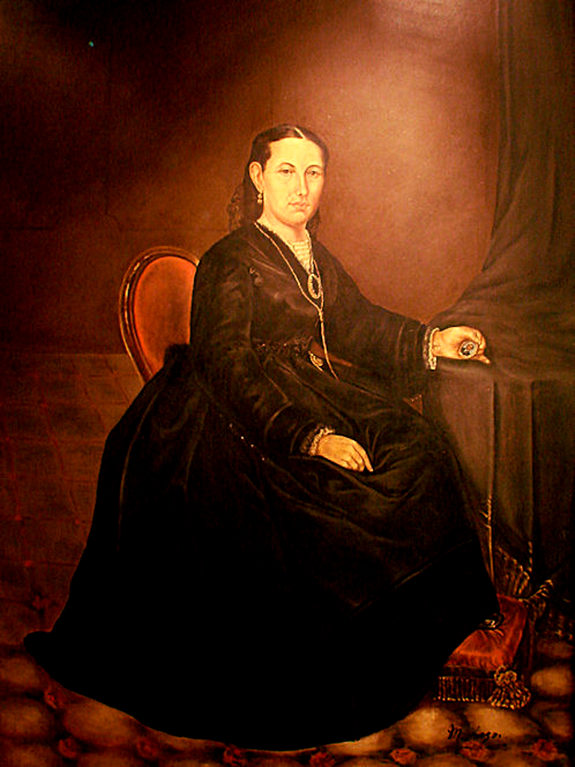 Foto de la pintura que se exhibe en el Recinto a Juárez. Photo taken in Benito Juárez Museum. National Palace. D. F. Mexico SPANISH: Fotos tomadas en el Recinto a Juárez. Palacio Nacional. México D.F.